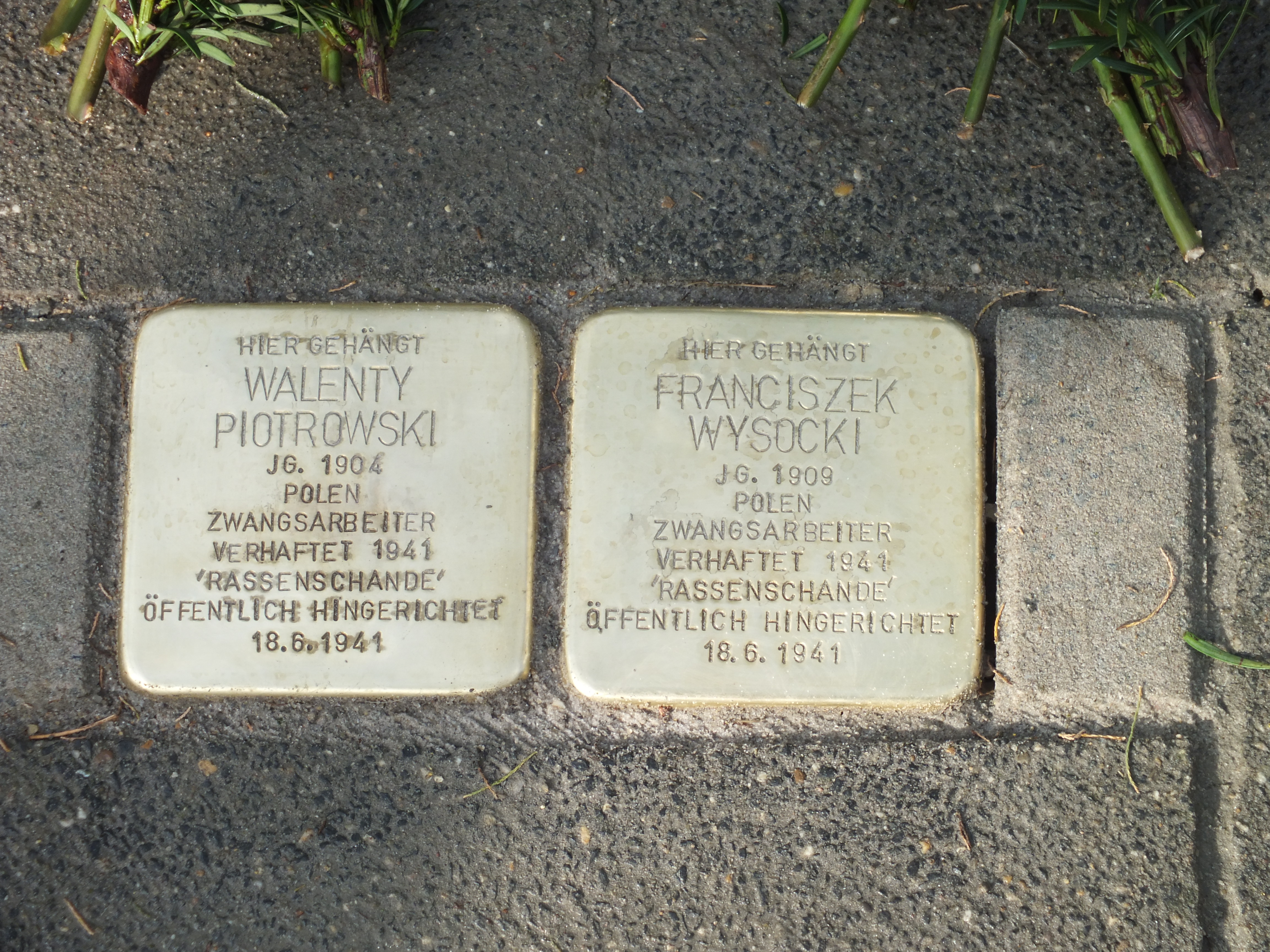 Zum Gedenken an den wegen angeblicher Rassenschande hingerichteten Walenty Piotrowski hat die IGBCE Ortsgruppe Düren diesen Stolperstein am 04.11.2017 verlegen lassen.